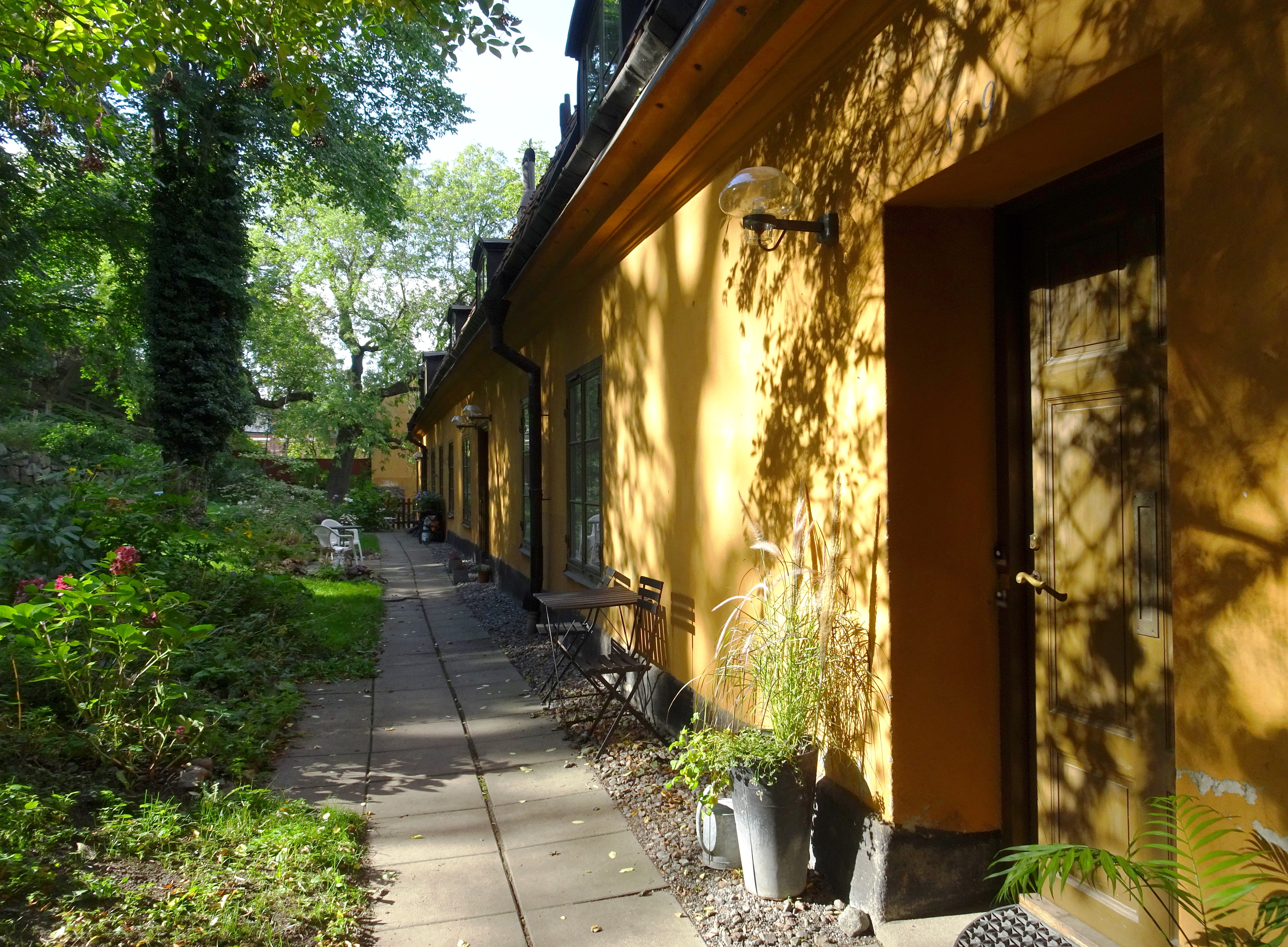 Bakgården Spännramen 2 (Öbergska gården), Södermalm